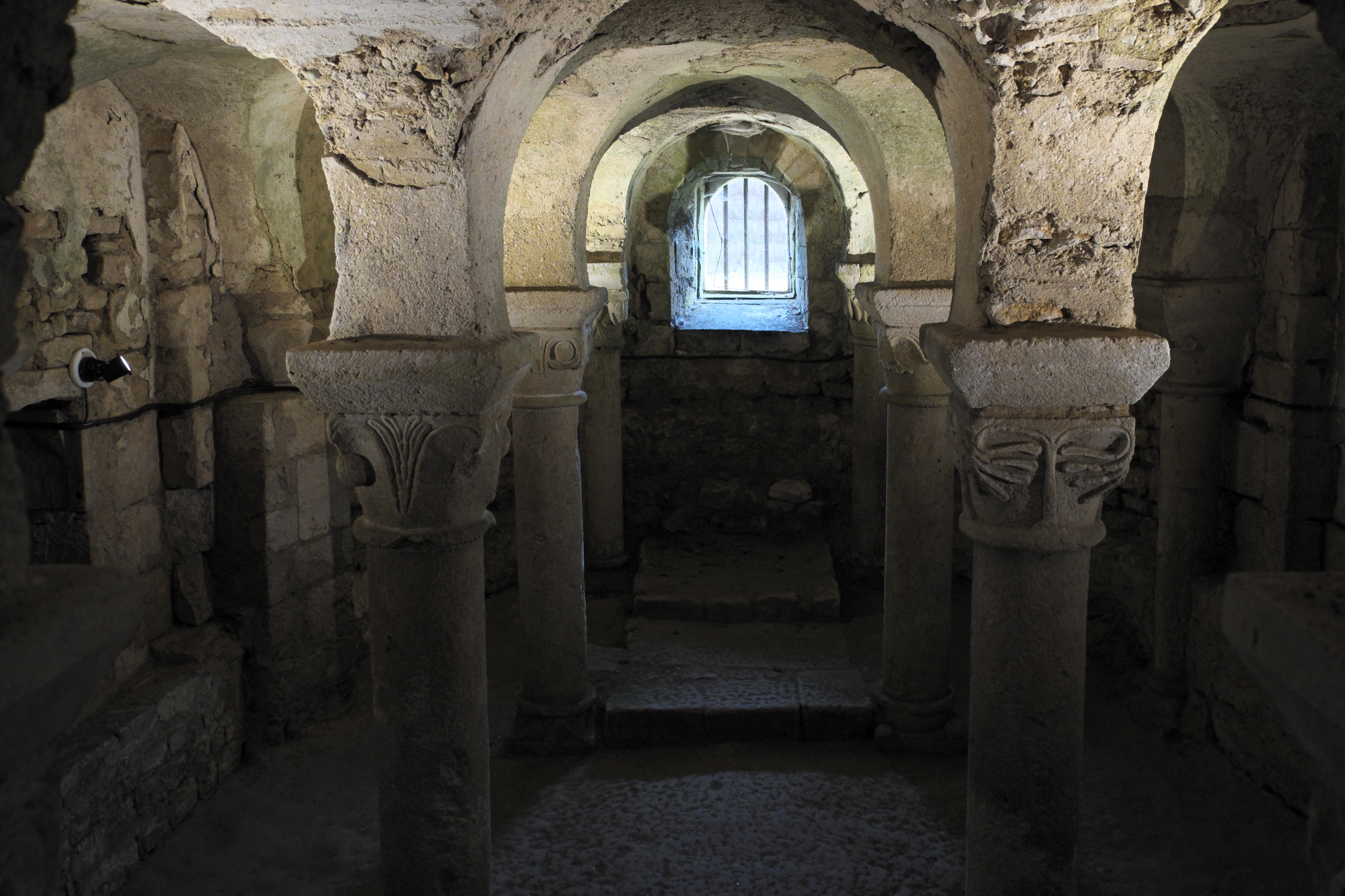 Kirche Saint-Romain in Curzon im Département Vendée (Pays de la Loire/Frankreich), Krypta aus dem 11. Jahrhundert